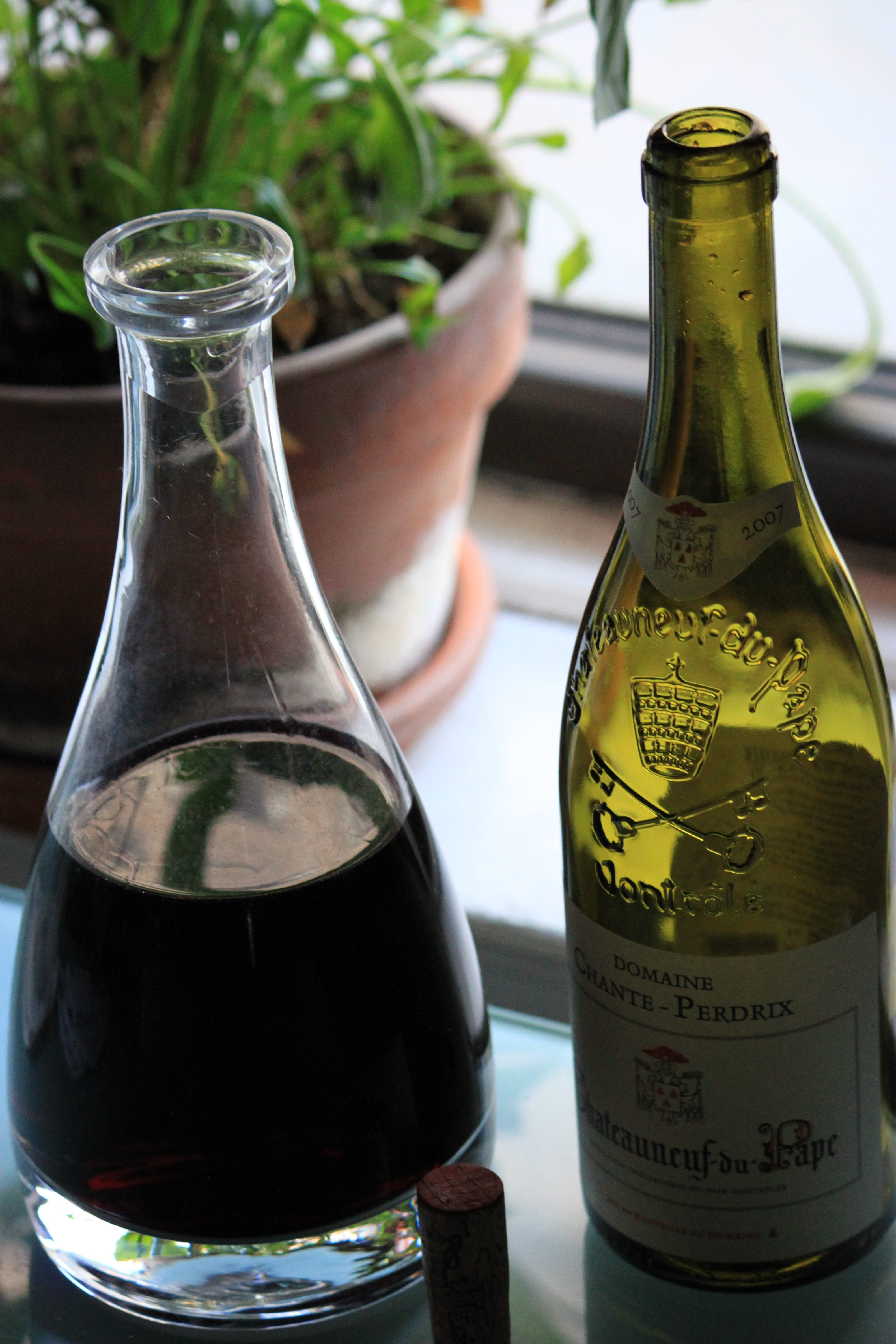 Décantation d'une bouteille d'AOC Châteauneuf-du-pape rouge